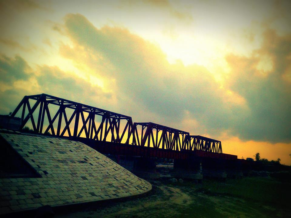 পরিকোট রেললাইন ব্রিজ